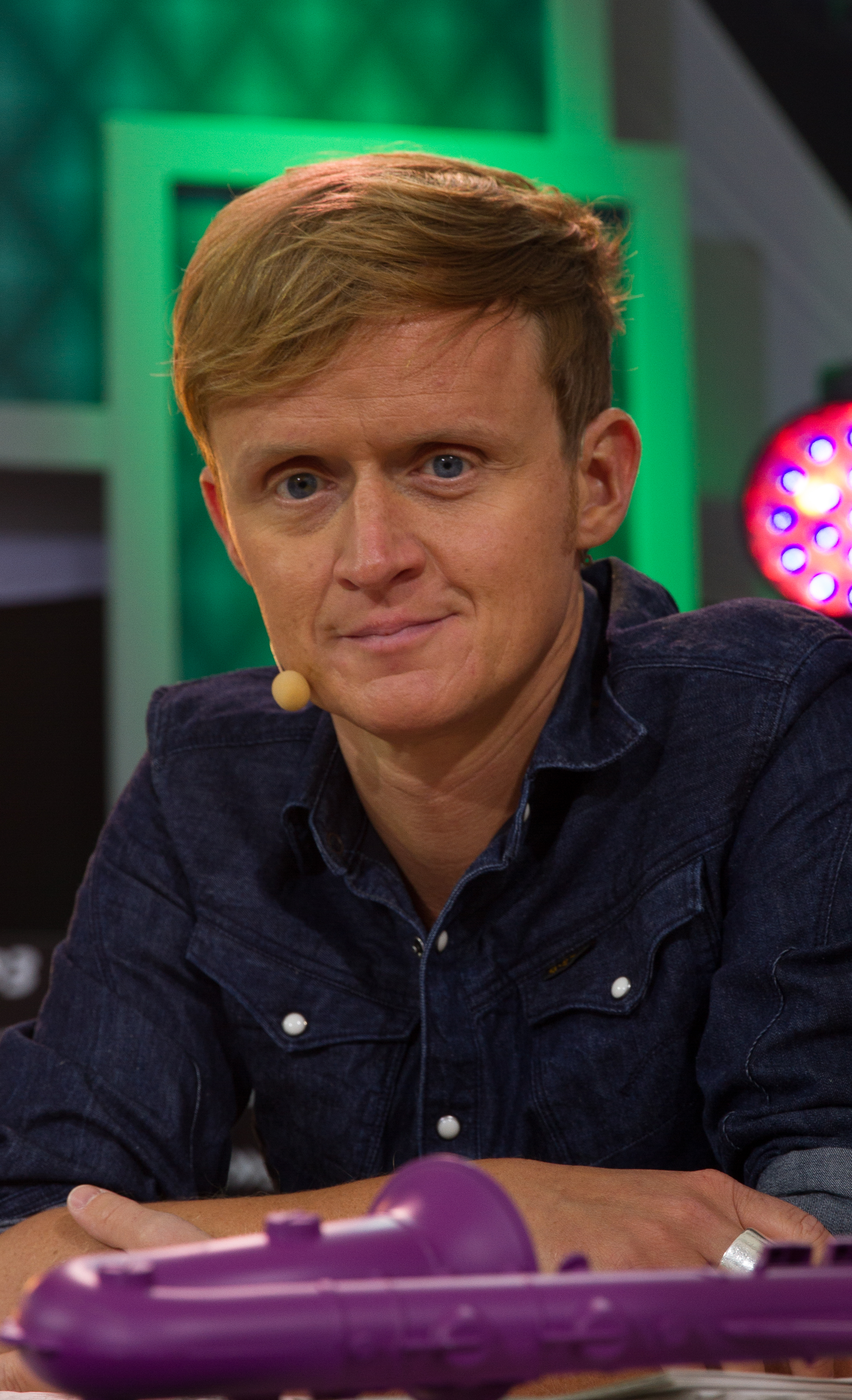 Pierre M. Krause beim New Pop Festival in Baden-Baden 2013 Festivalsommer This photo was created with the support of donations to Wikimedia Deutschland in the context of the CPB project "Festival Summer".